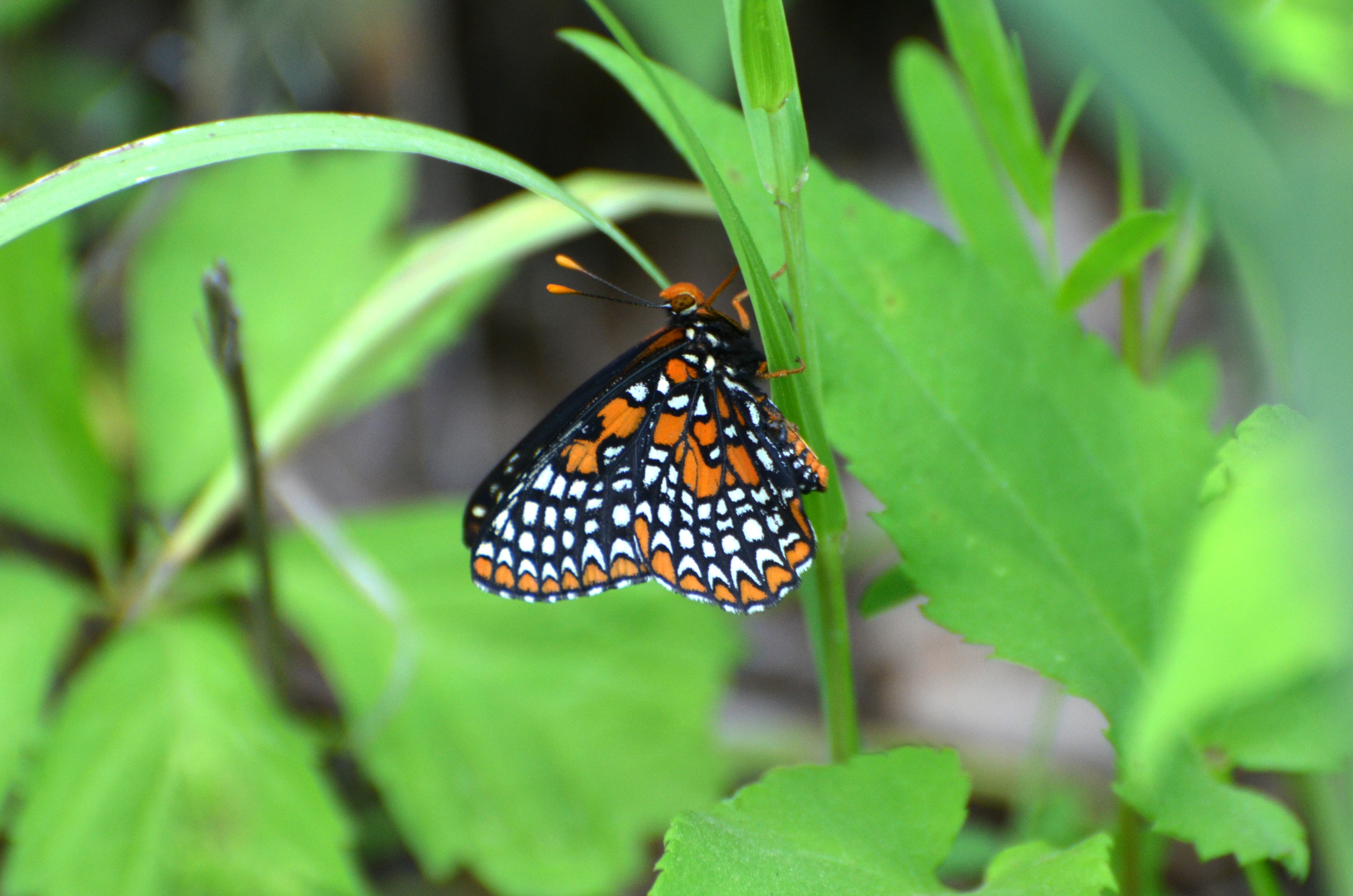 Missouri 5/31/14